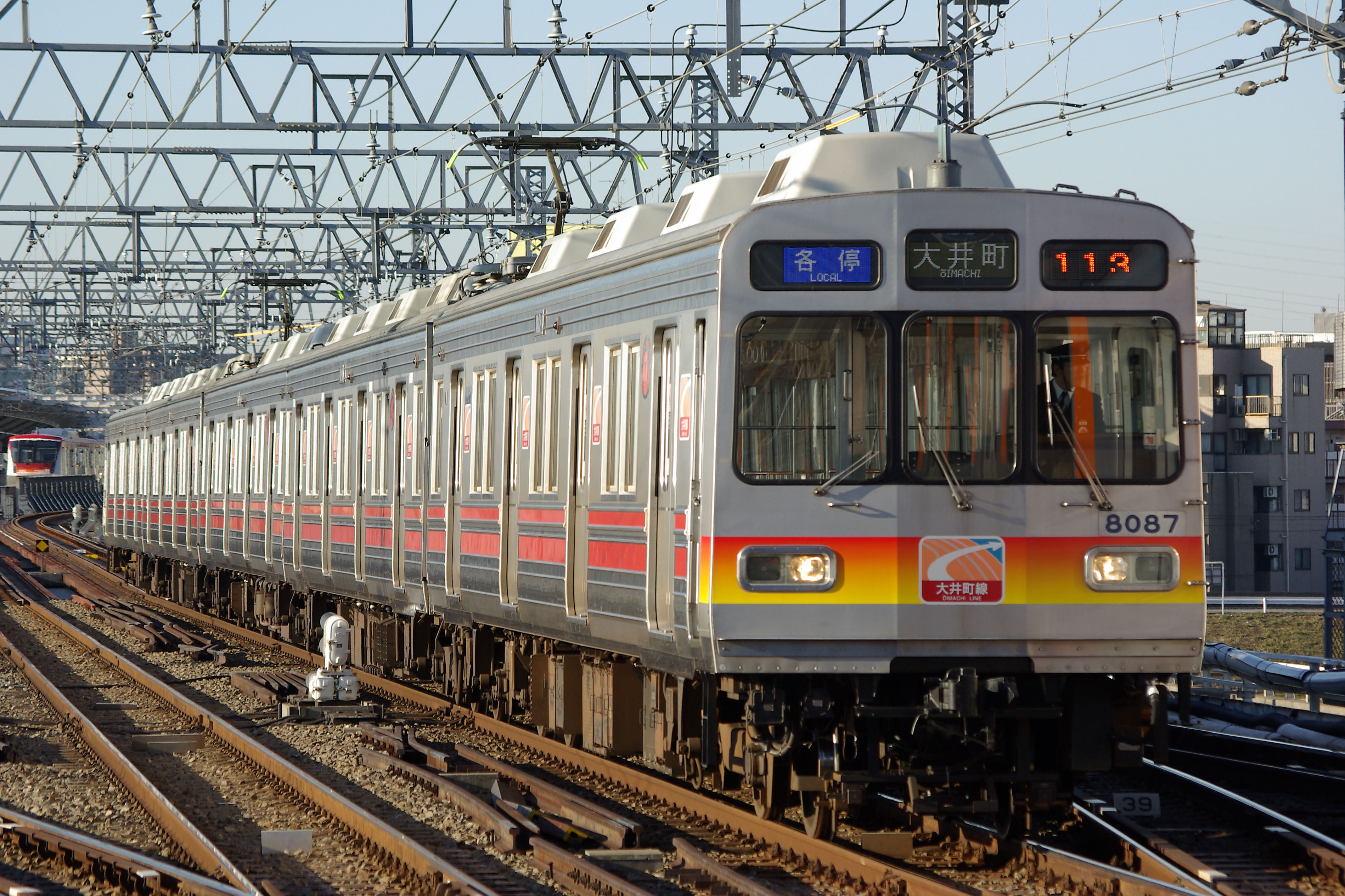 東急8090系電車 8087F フルカラーLED化後